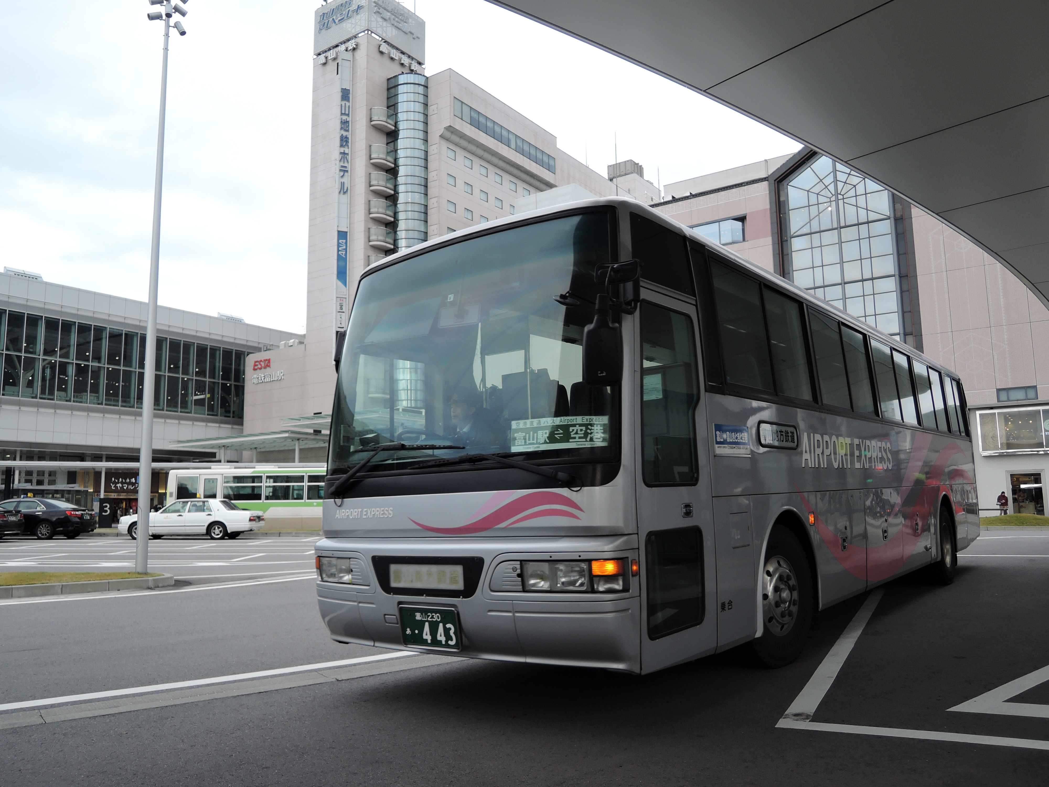 富山地鉄空港連絡バス 443号（富山駅前にて）